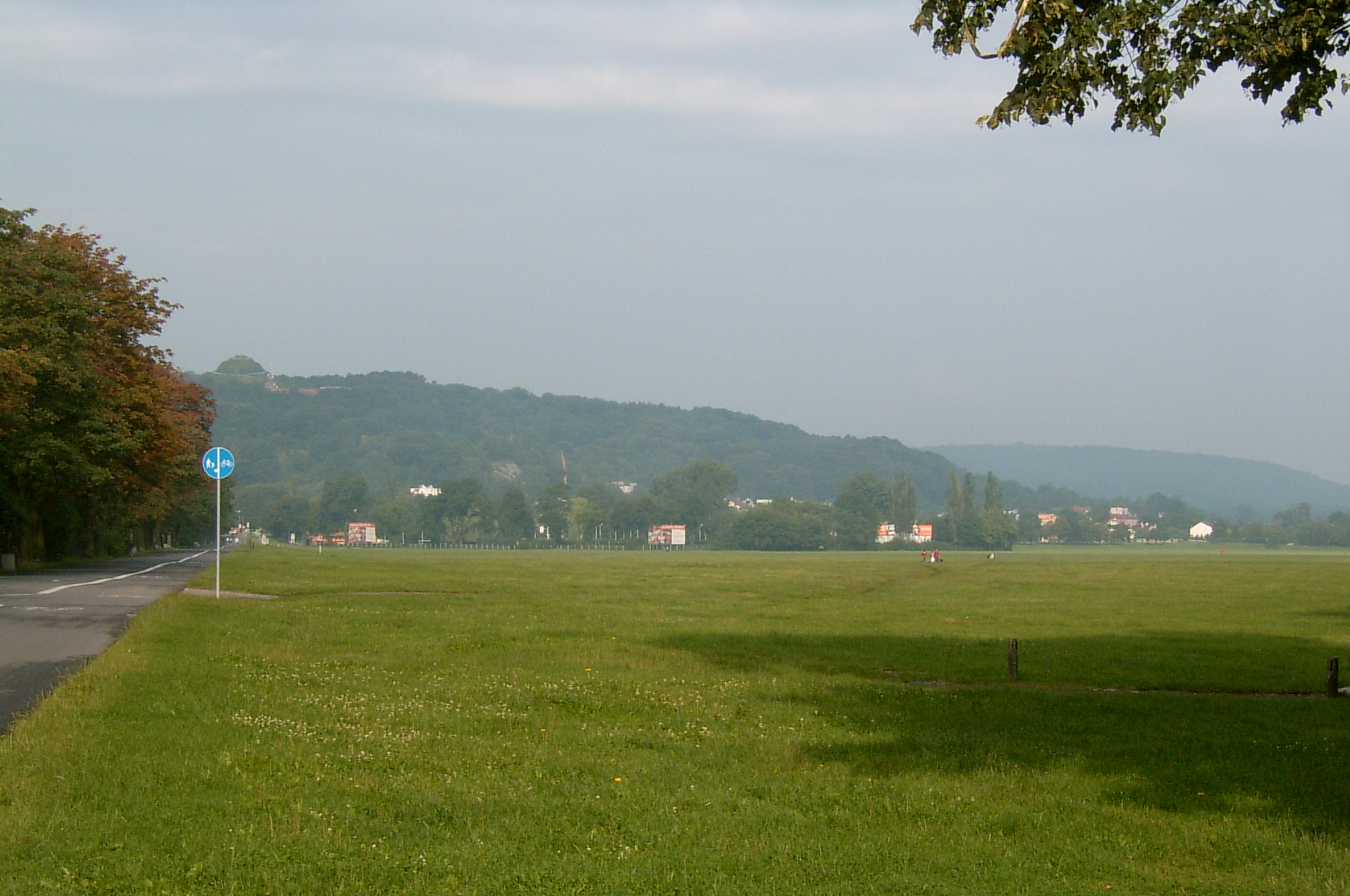 Kraków, Poland